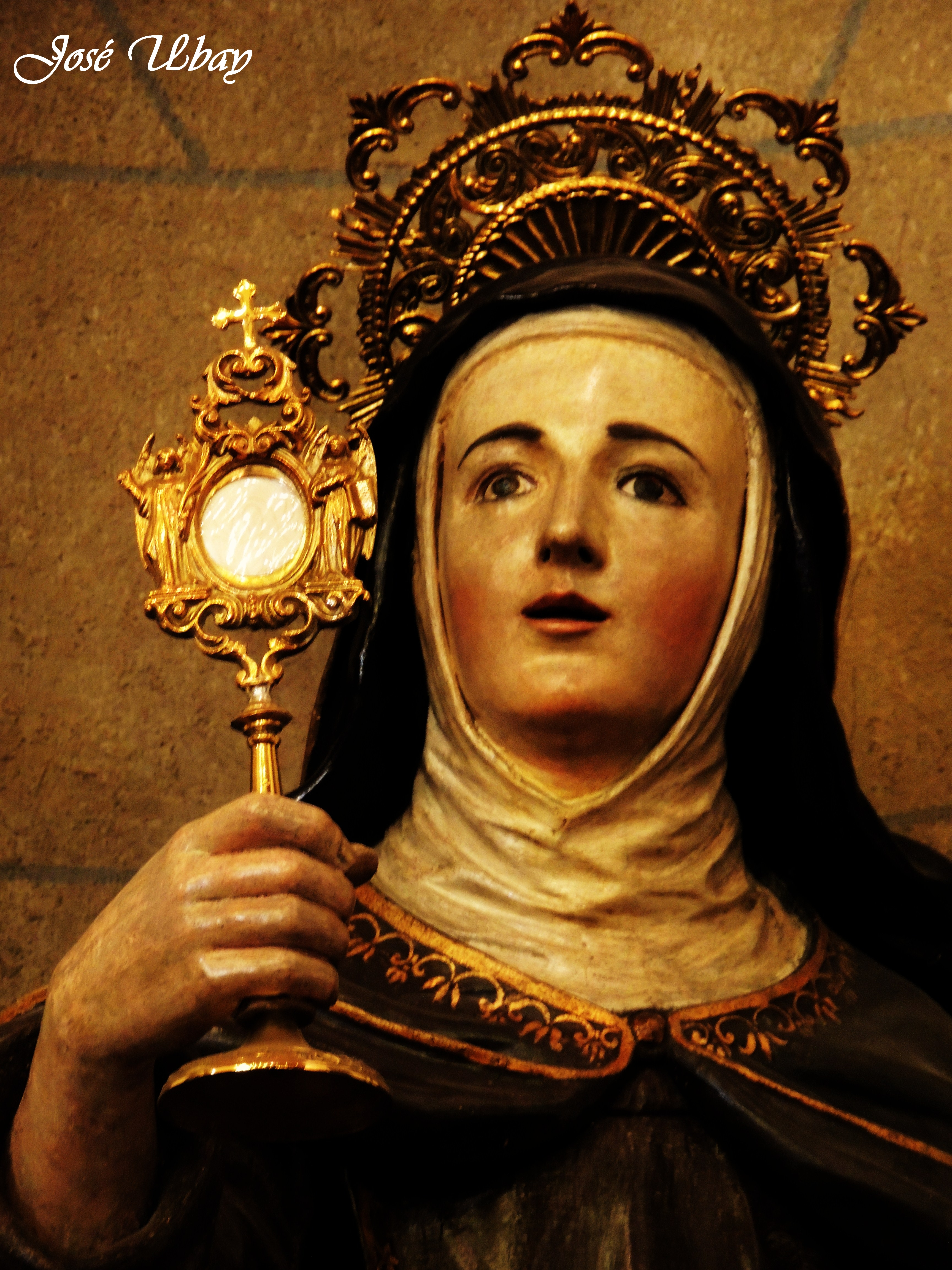 Santa Clara de Asís. siglo XVII. Anónimo. Parroquia de san Francisco de Asís - Las Palmas de Gran Canaria.